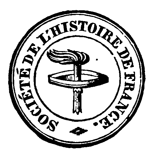 Marque f'éditeur de la Société de l’Histoire de France